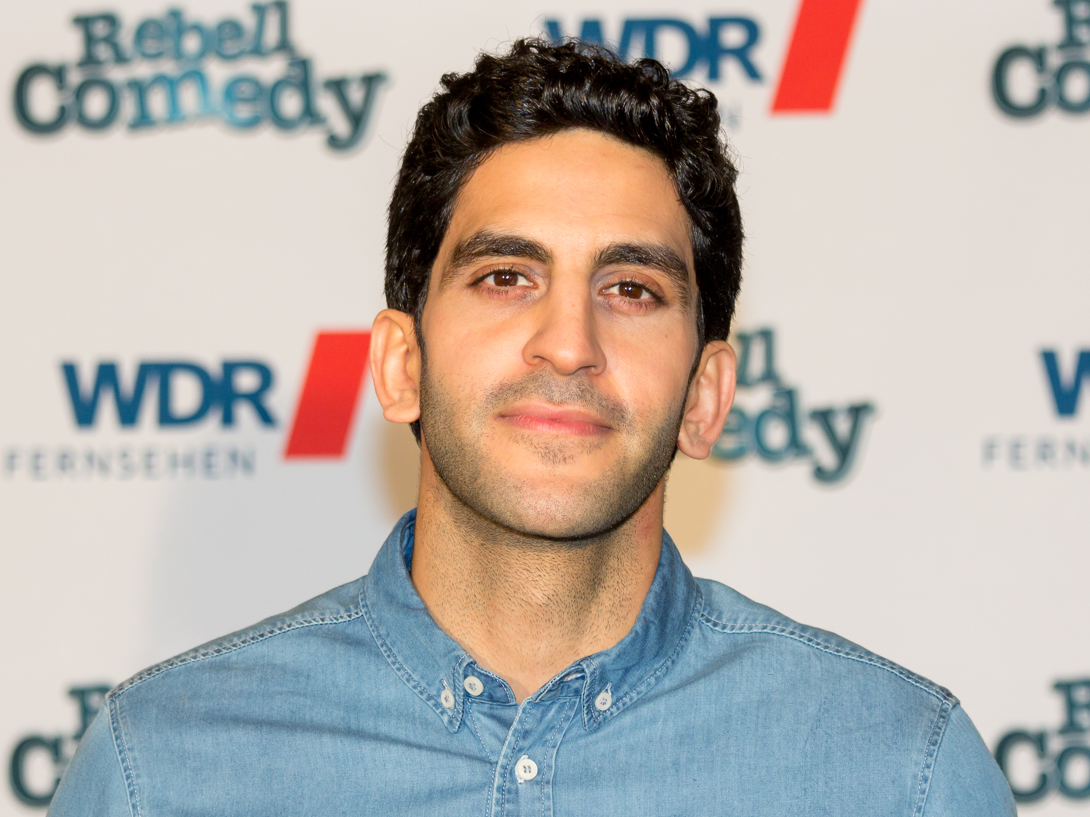 RebellComedy - WDR-Pressetermin im Gloria Foto: Babak Ghassim (gondebak)